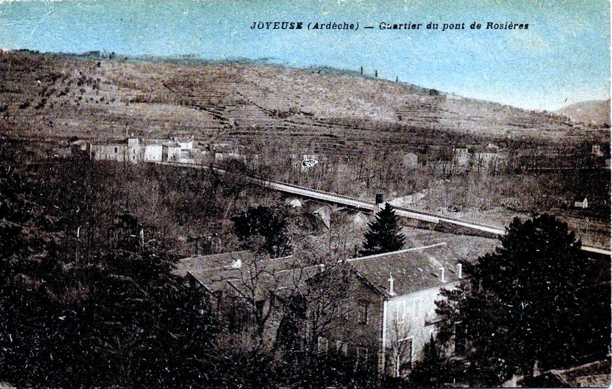 Carte postale du pont entre Rosiéres et Joyeuse vers 1920 le pont est doublé par la voie du tramway et on remarque un chateau d'eau. Au premier plan;les usines. Les collines sont toutes déboisées, les faisses entretenues.